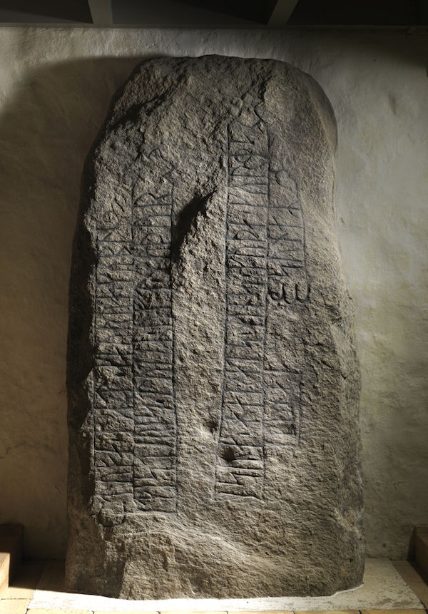 Foto: Nationalmuseet ved Roberto Fortuna